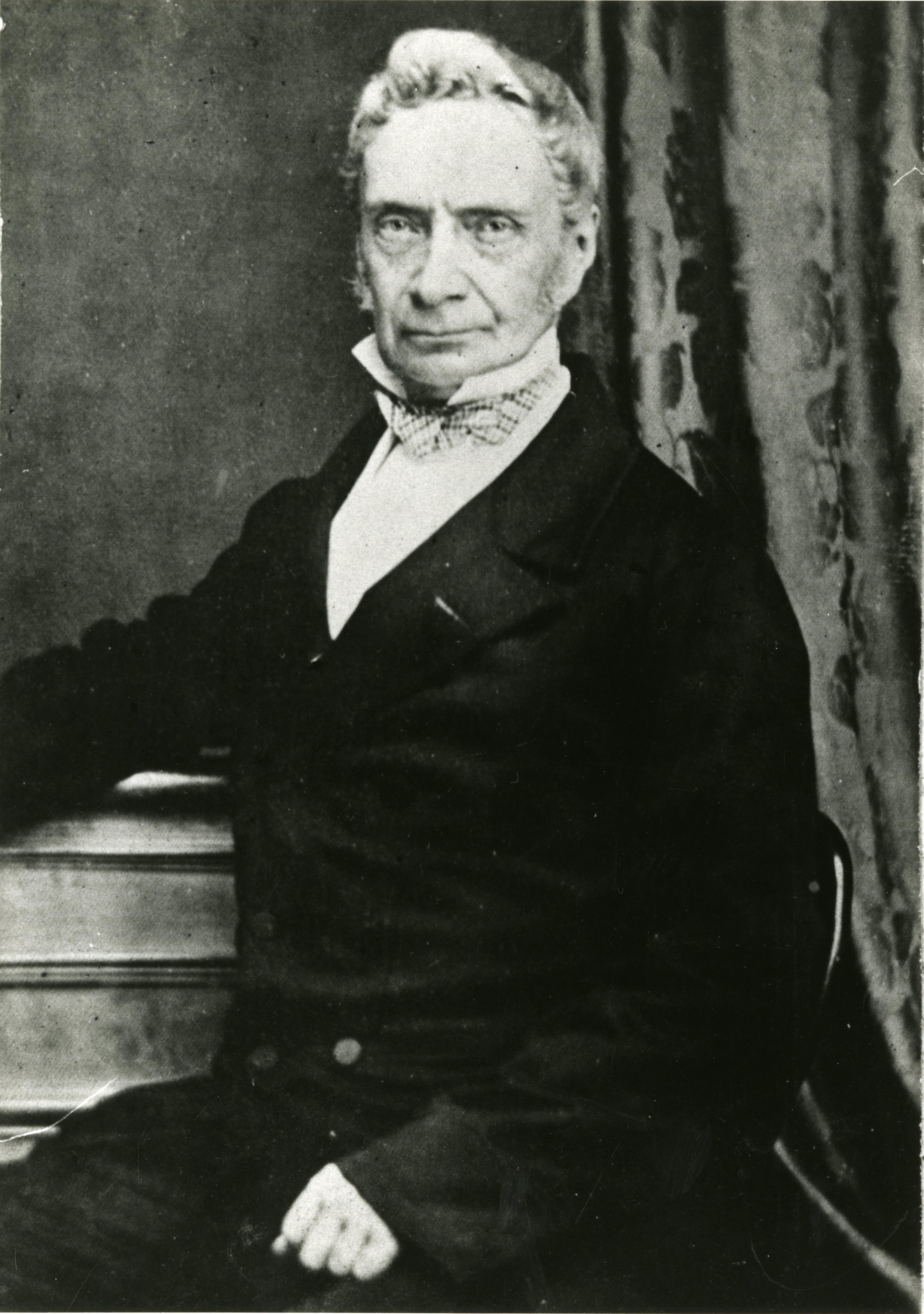 Mr. H. Provo Kluit (1803-1860), raadsheer bij de Hoge Raad (1853-1860)